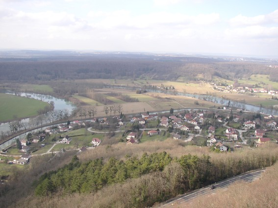 Vue sur le village d'Aveney et la boucle du Doubs depuis le belvédère du "Rocher de Valmy" ( Photo J L). Licensing